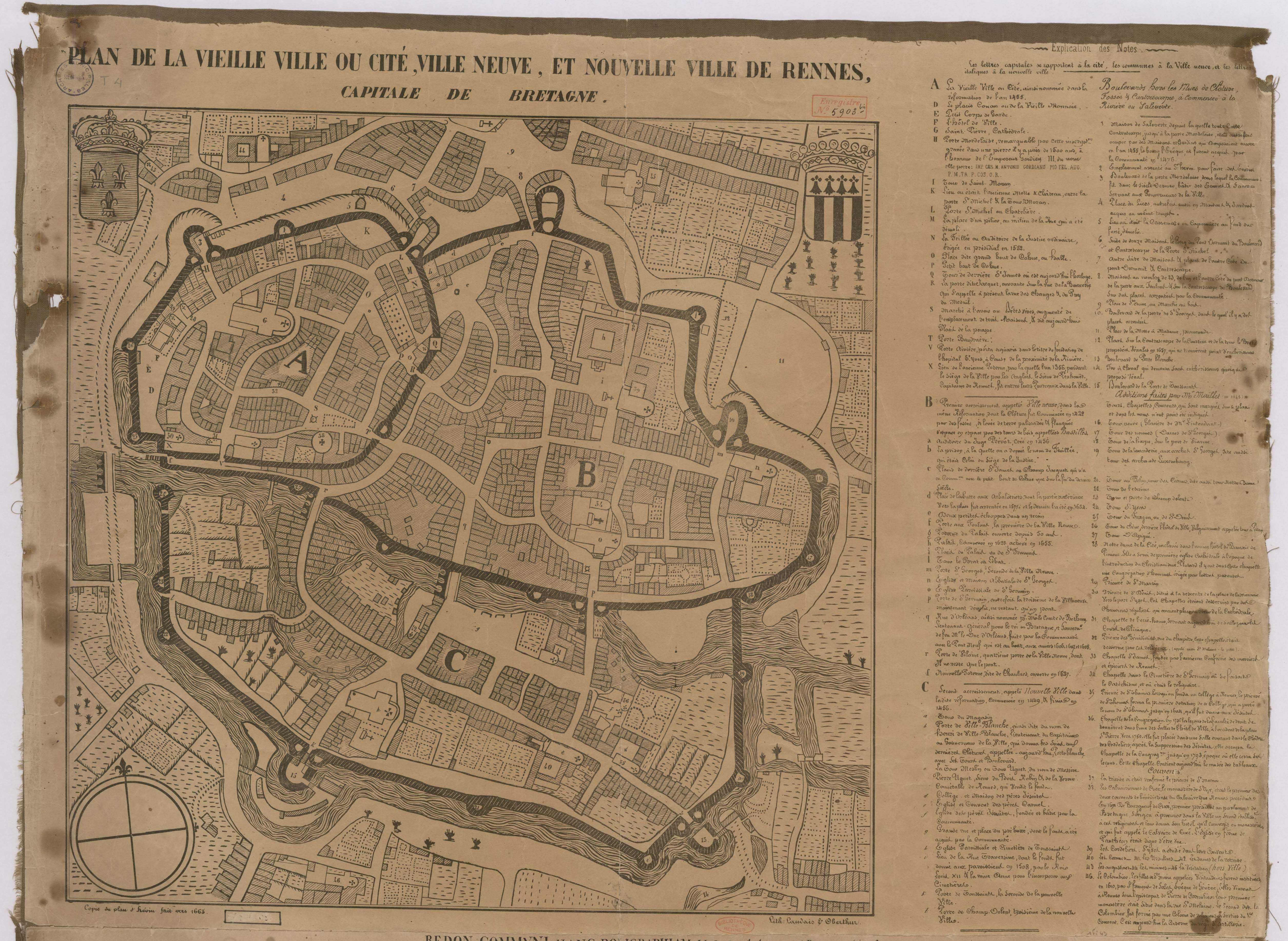 Copie d'un plan d'Hévin fait vers 1663